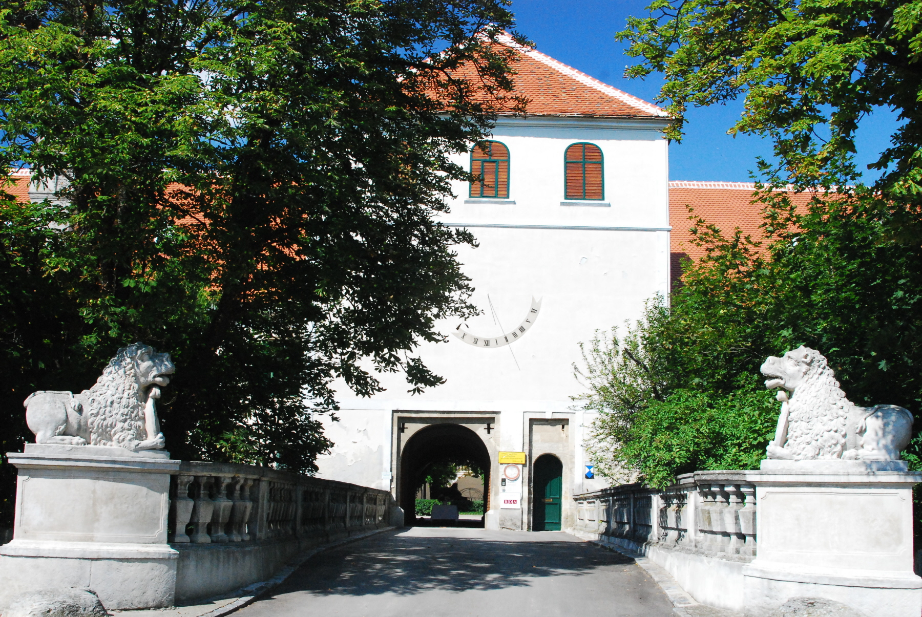 Der Eingang vom Schloss in Guntersdorf in Niederösterreich